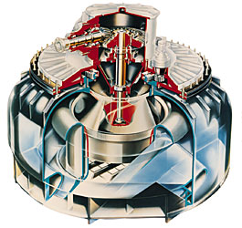 Pumpjet